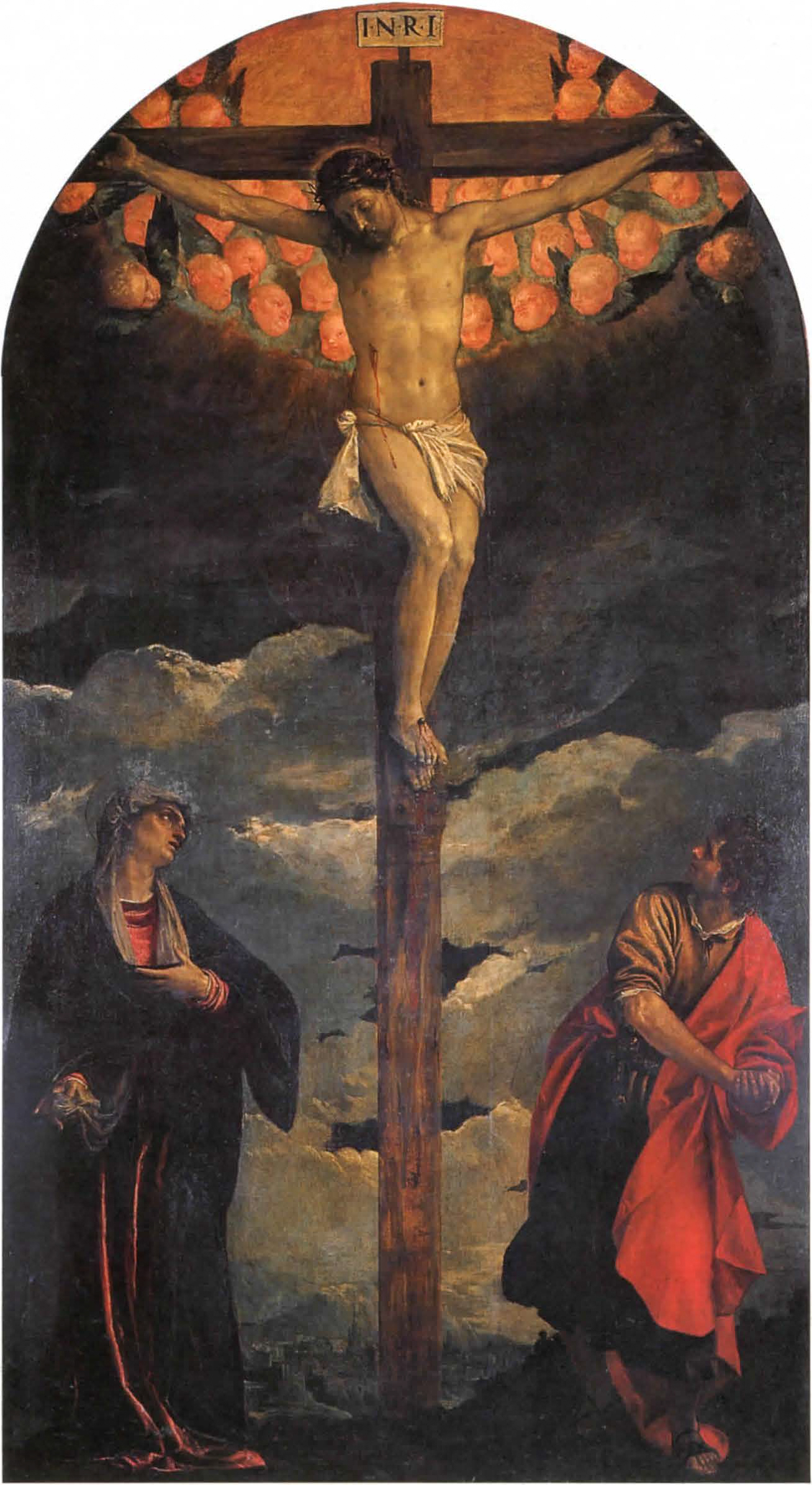 Crocifissione dipinto di Paolo Veronese già nella chiesa degli Incurabili